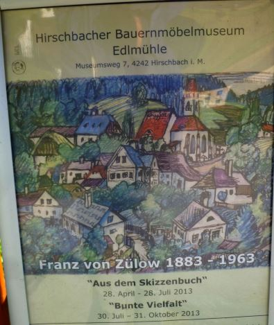 Franz von Zülow-Ausstellung 2013